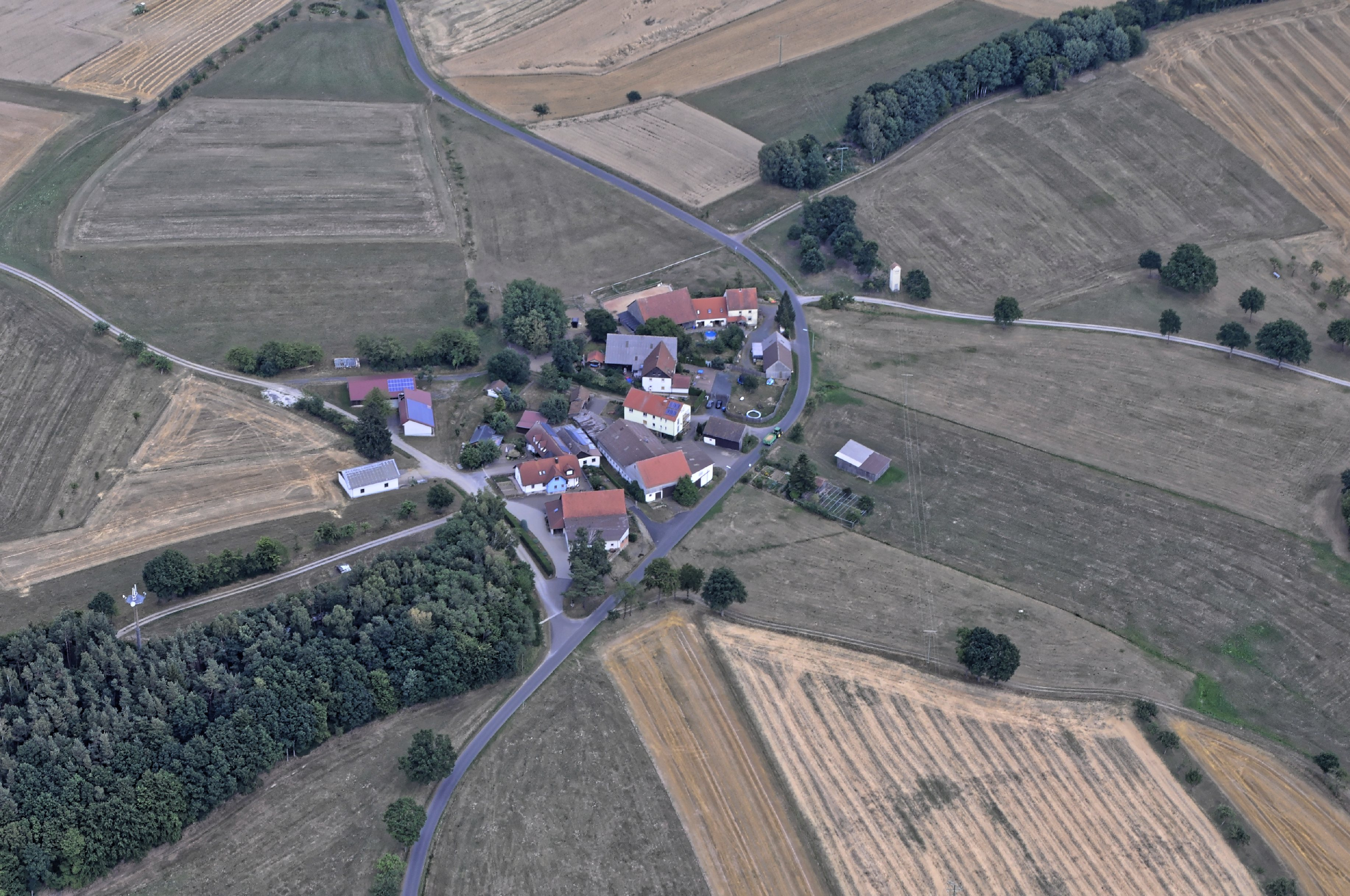 Bilder vom Flug Nordholz-Hammelburg 2015: Obergeiersnest, Ortsteil von Schondra.